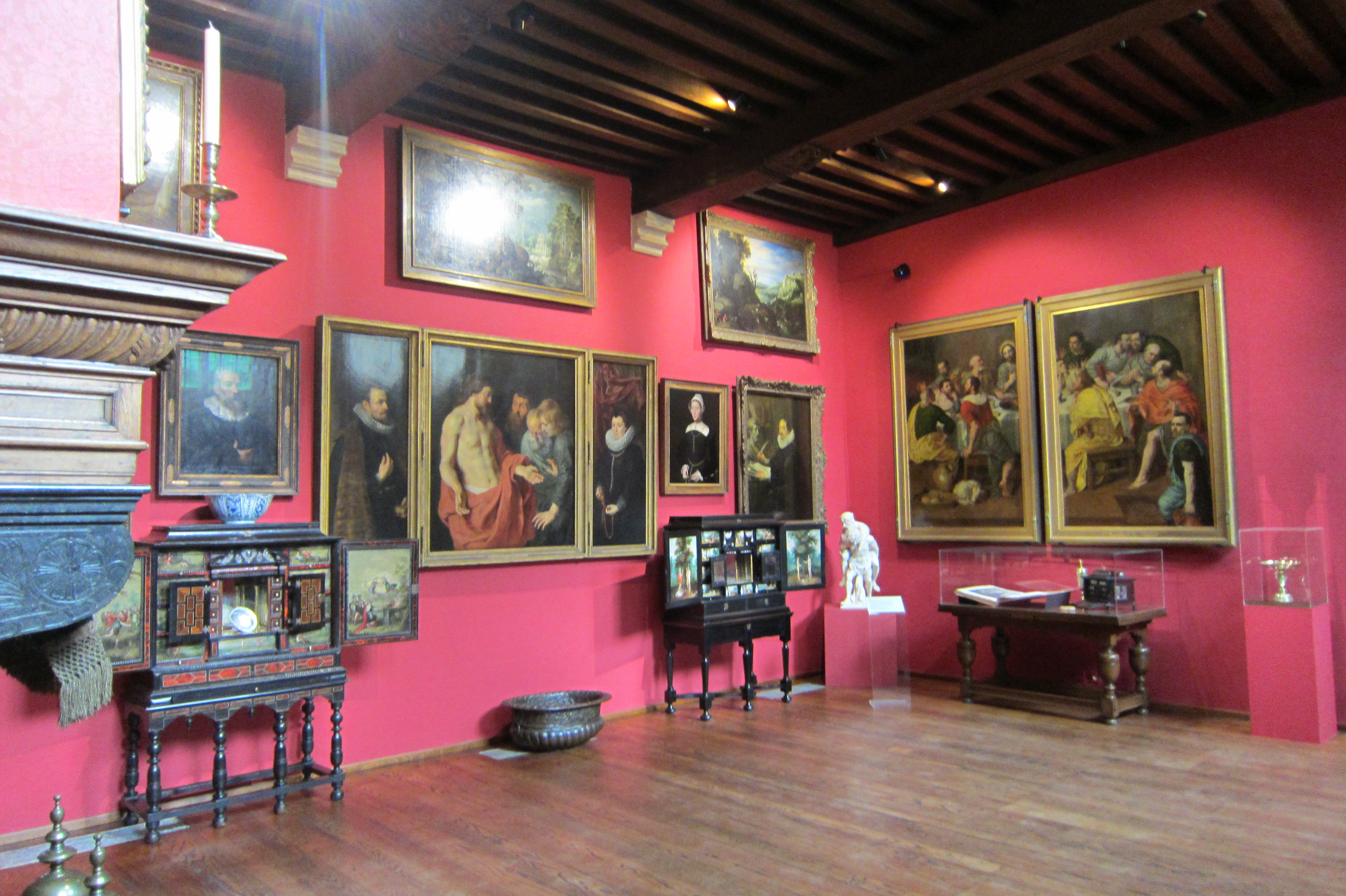 Een kamer uit Het Gulden Cabinet, Rockoxhuis, Antwerpen